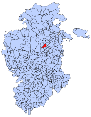 Galbarros en Burgos